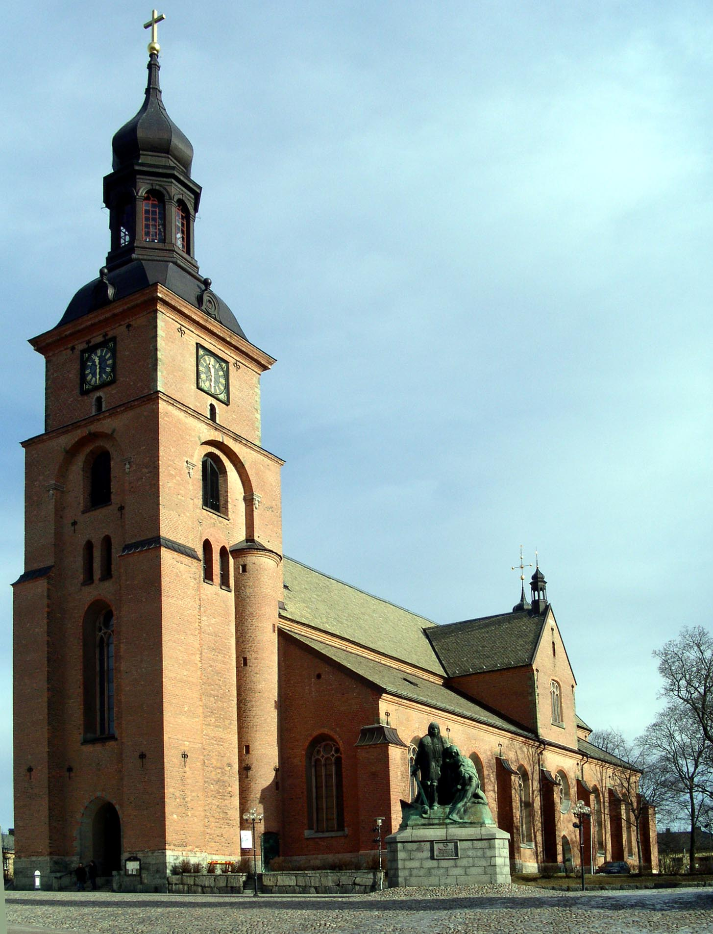 Falu Kristine kyrka. (Perspektivet i bilden är justerat)